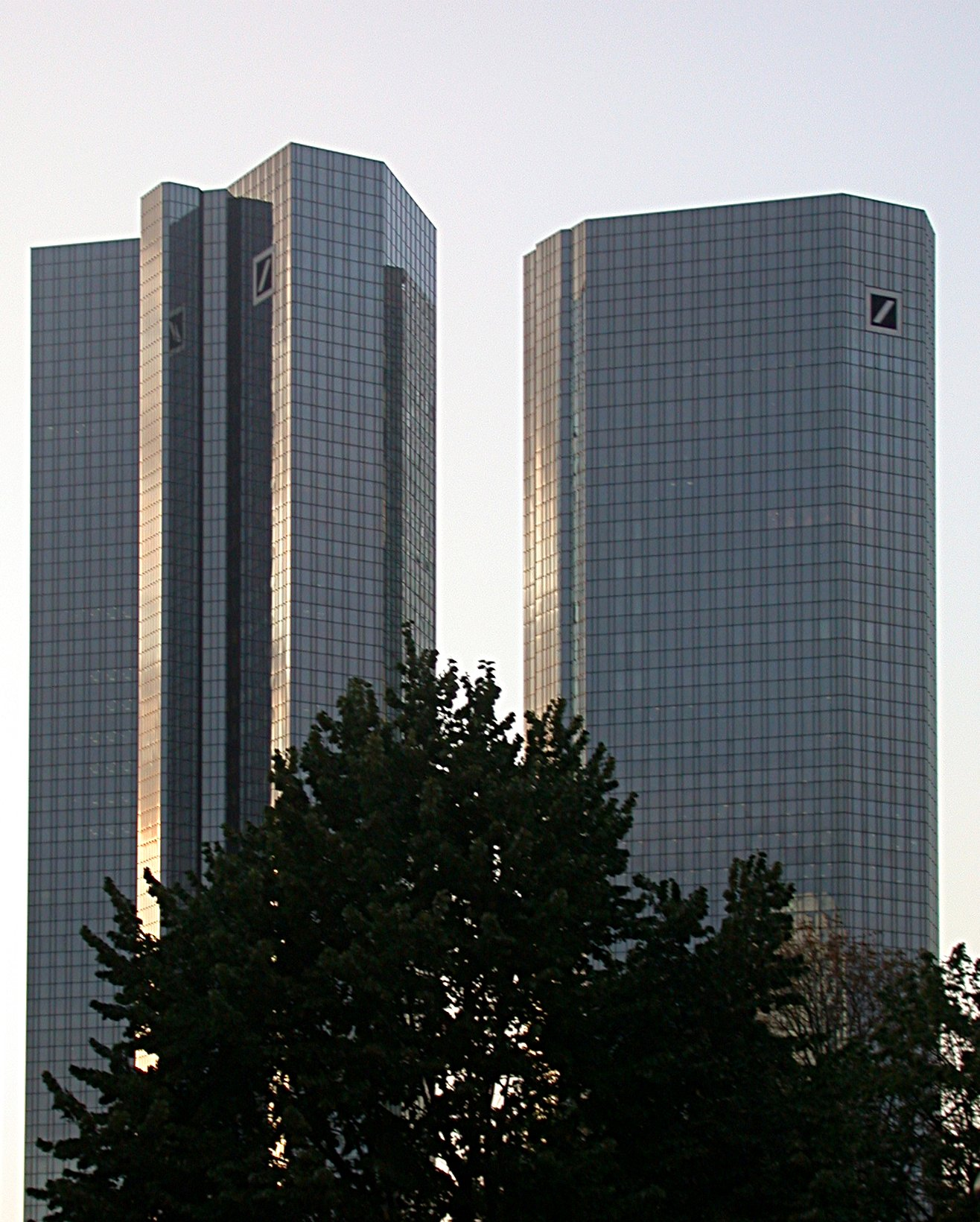 Deutsche Bank Zentrale mit Taunusanlage